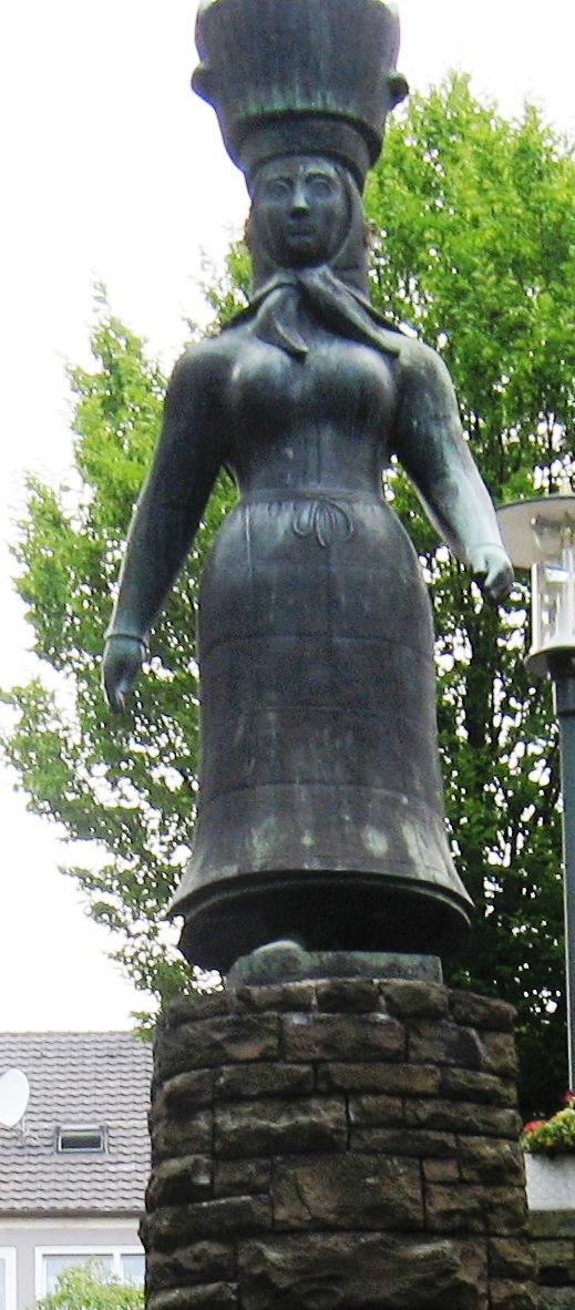 Solinger Lieferfrau, "Liëwerfrau", Denkmal in der Solinger Innenstadt, von Erlefried Hoppe